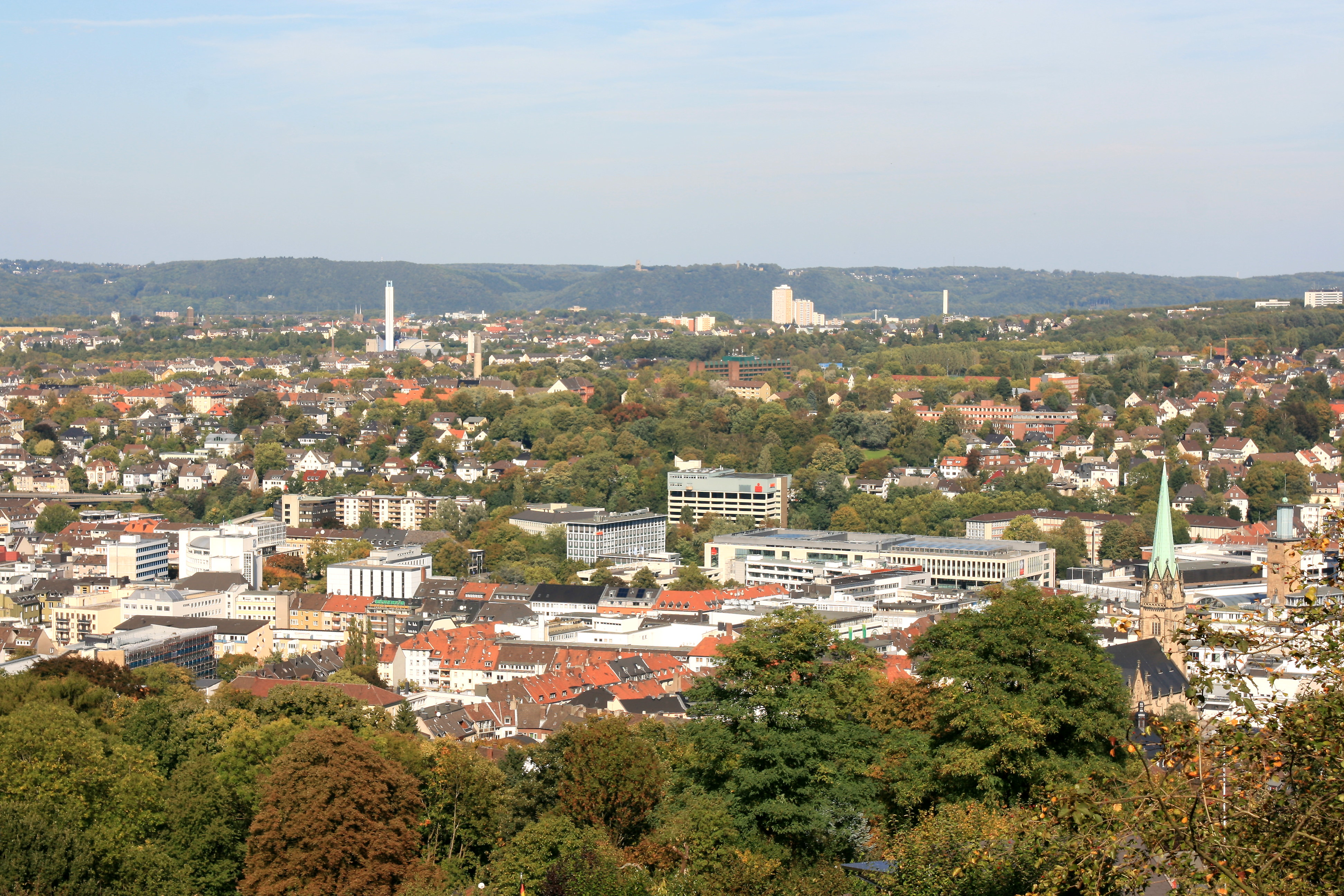 Blick vom Goldberg in Hagen, Neubau der Sparkasse Hagen etwas rechts von der Bildmitte, Rathaus am rechten Bildrand